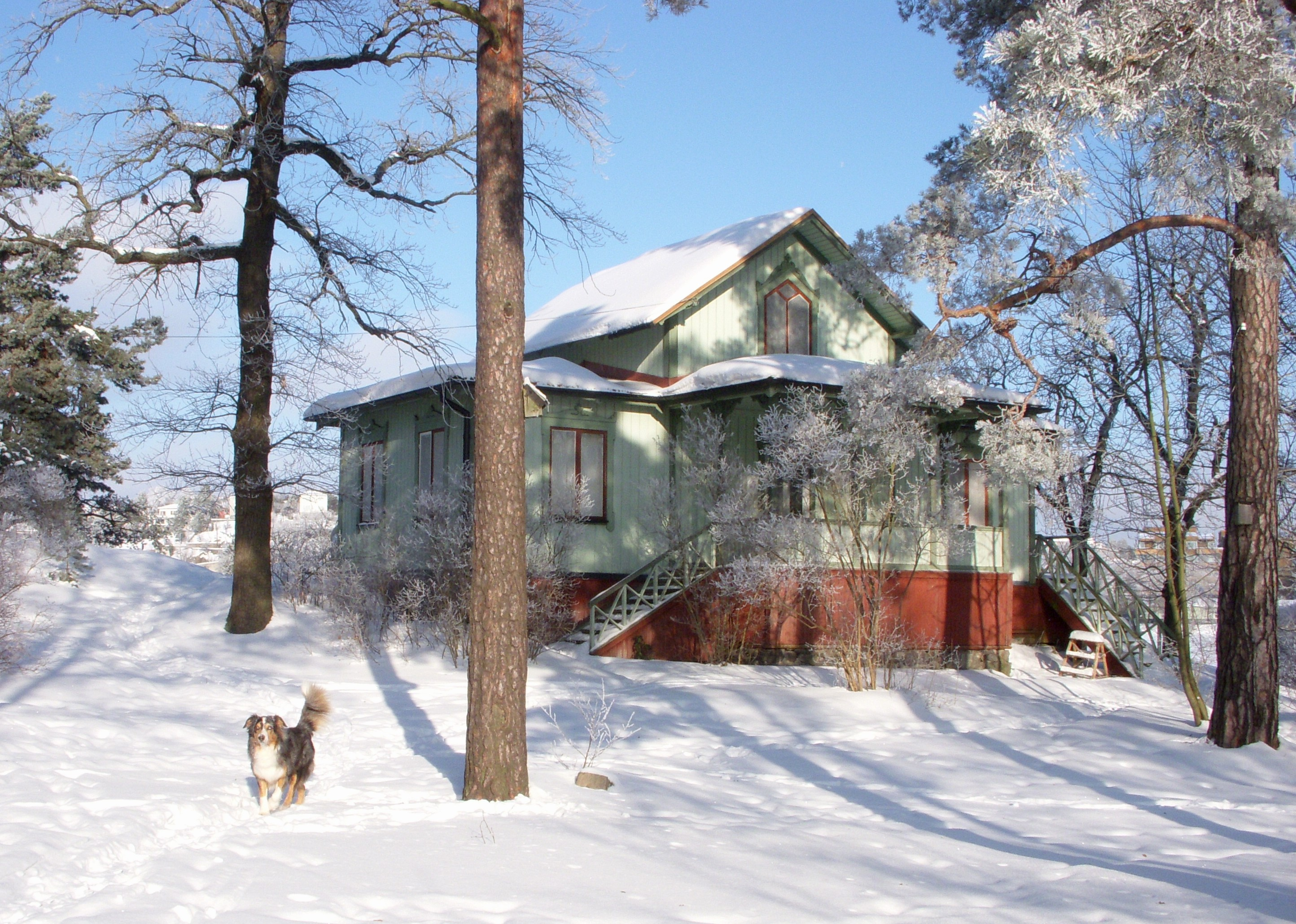 Lindholmen (Mälaren) på vintern 2010